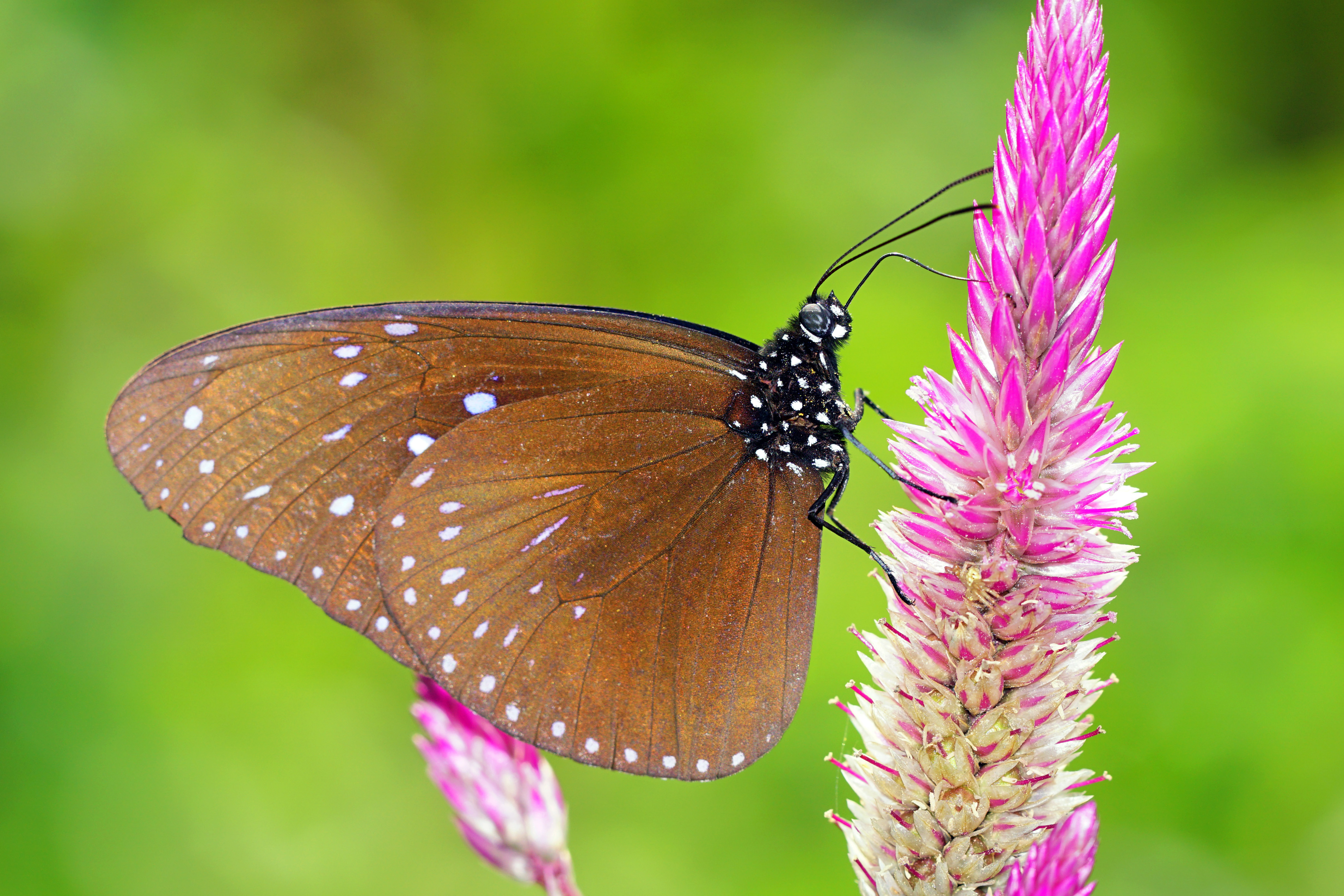 異紋紫斑蝶 Euploea mulciber barsine